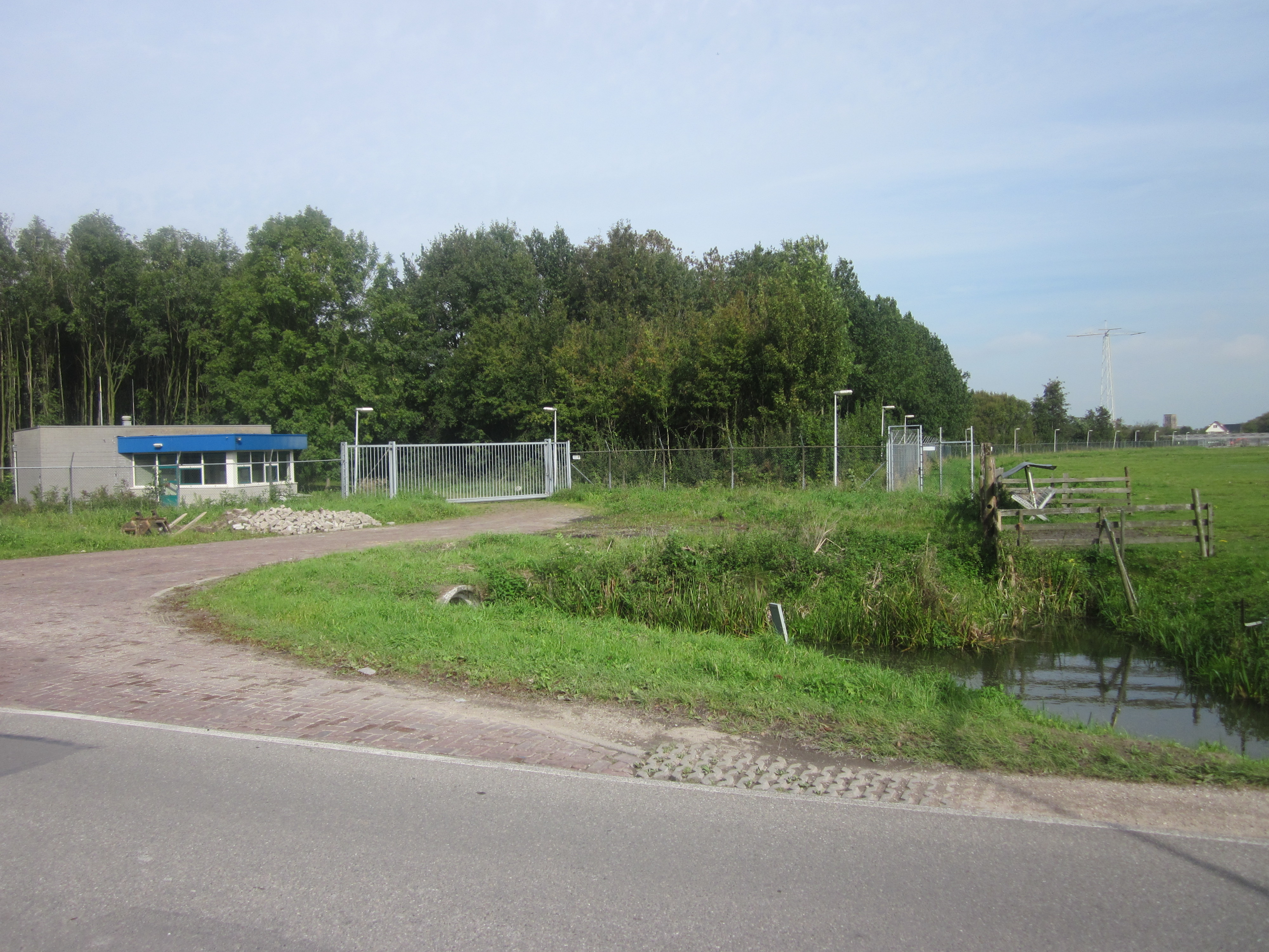 Plaats waar het schefferkamp heeft gestaan in De Lier, Nederland. Momenteel (2010) wordt het nog gebruikt door Defensie.